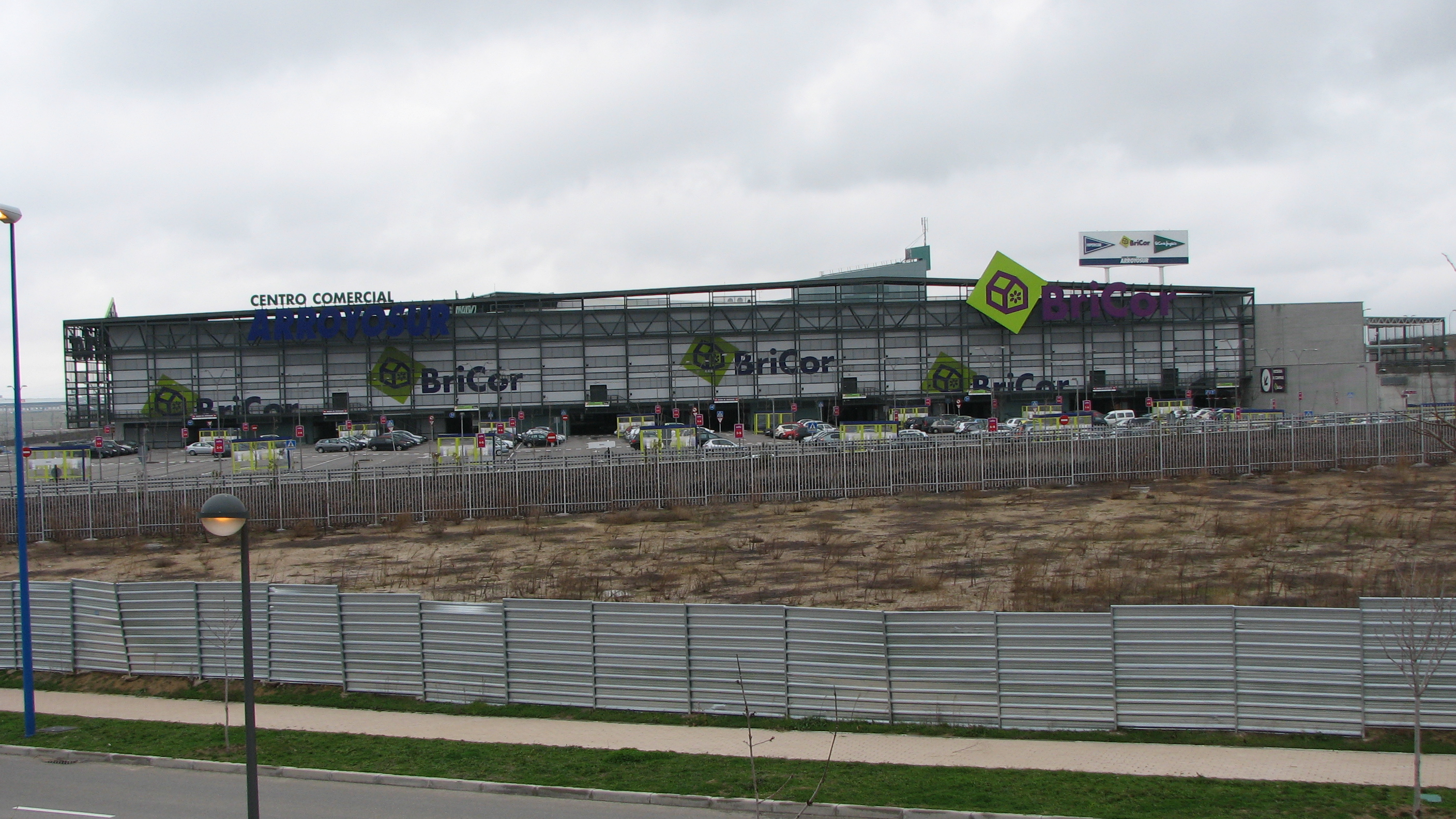 Centro Comercial Arroyosur. Vista Este. Bricor. Leganés. España.